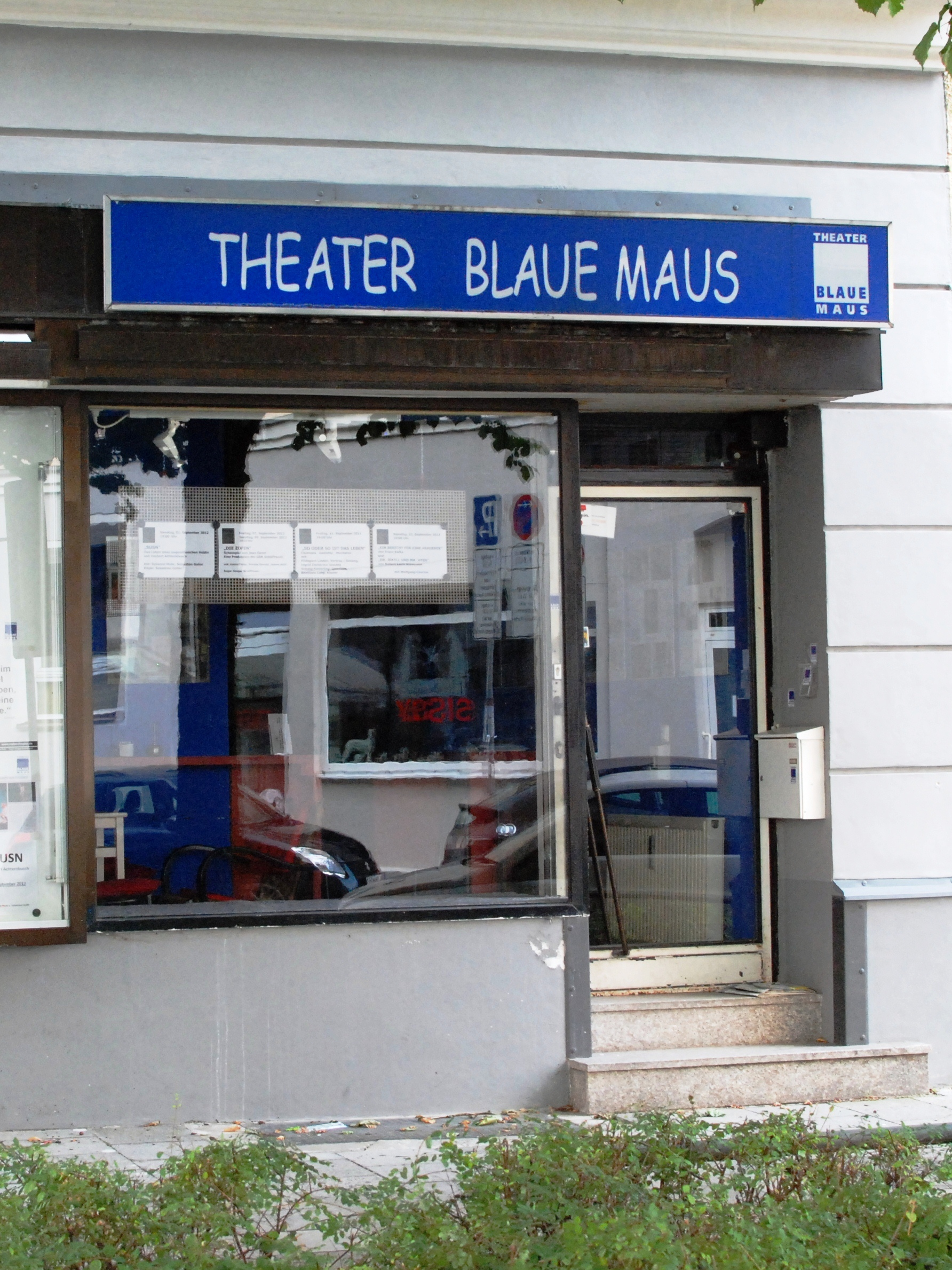 Theater Blaue Maus in der Elvirastraße in Neuhausen, Stadtteil von München, Regierungsbezirk Oberbayern, Bayern. Nach Eigenangaben kleinstes Theater Münchens.